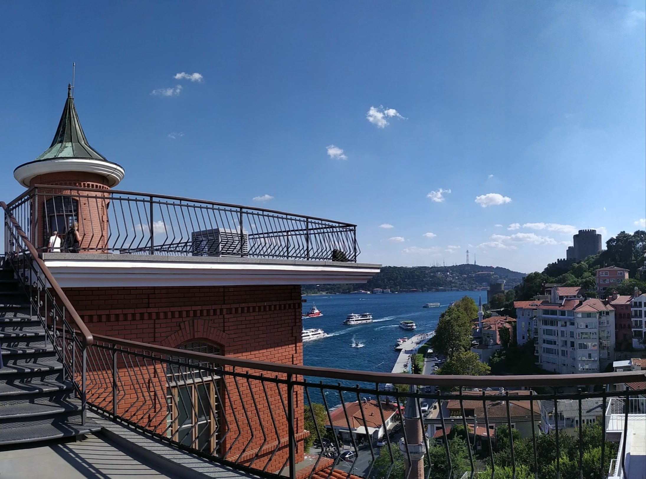 Borusan Holding binası, Perili Köşk, İstanbul Boğazı